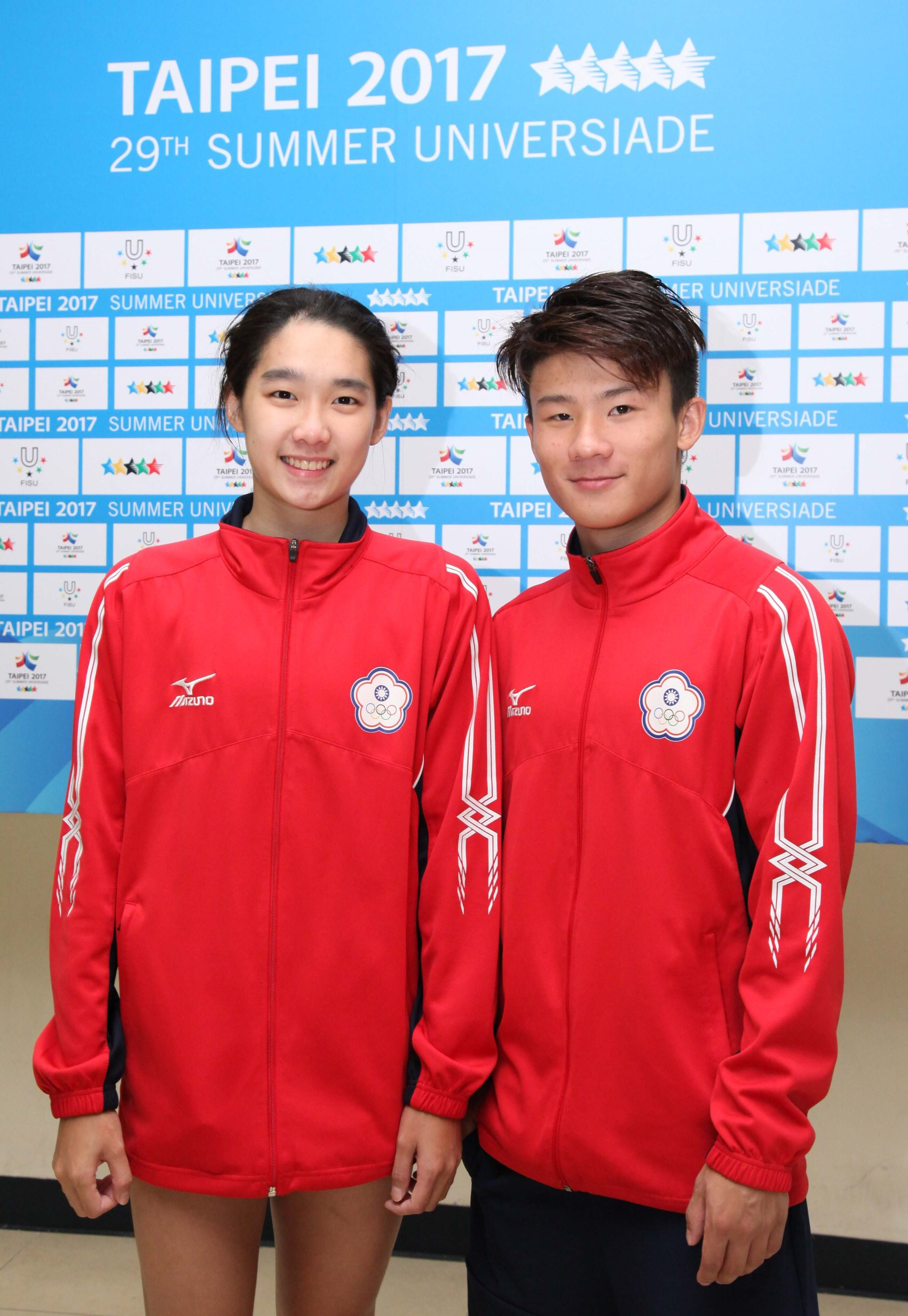 2017台北城市盃國際邀請賽暨世界大學運動會測試賽，中華台北跳水隊選手林昀蒂、賴昱燕。